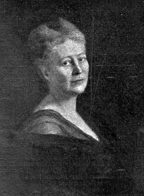 Emma von Miguel-Wedekind (1847–1915). Gemalt von Hans Otto Baumann (1862–1927) Maler